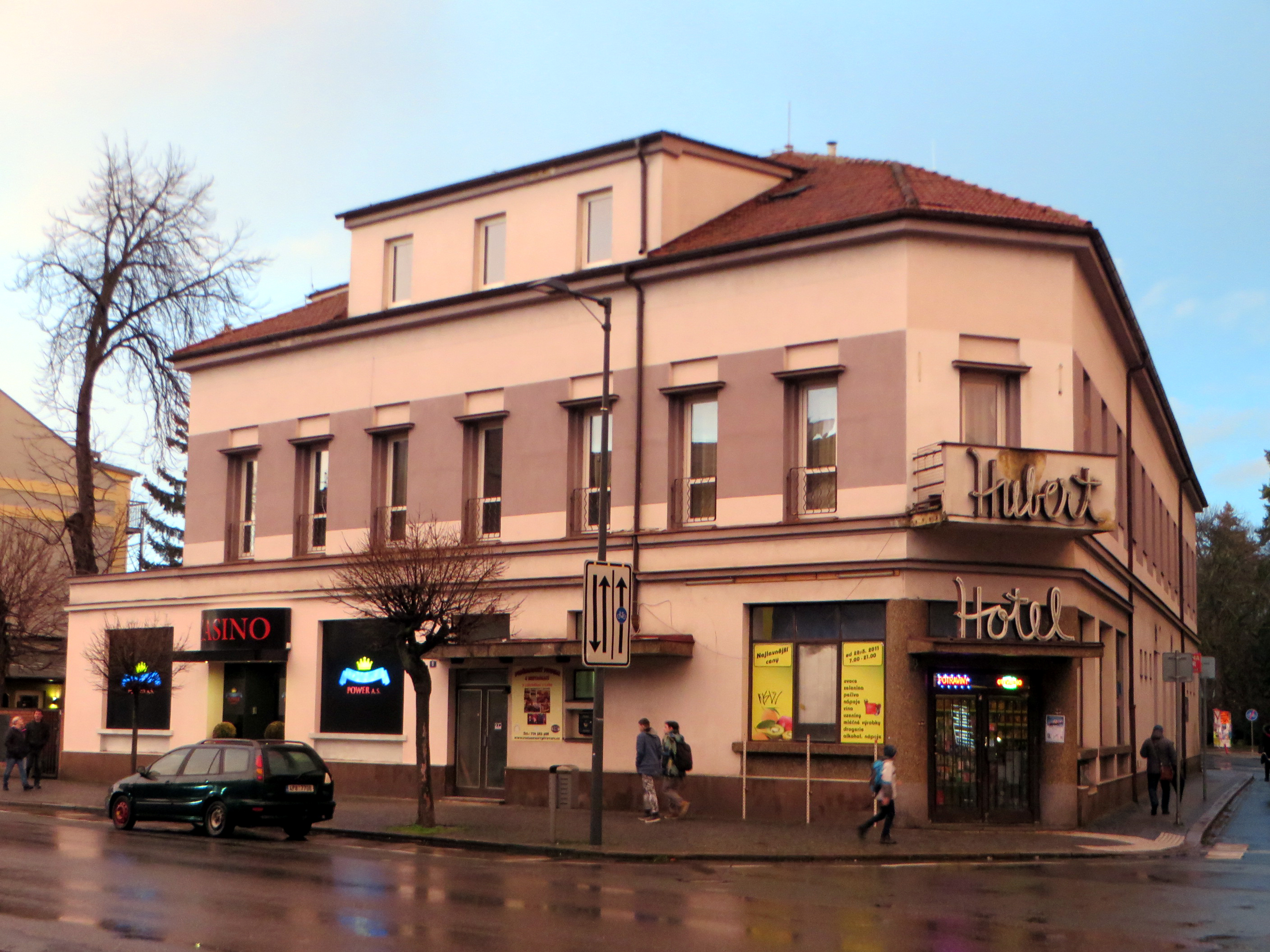 Bývalý Hotel Hubert na Riegrově náměstí.